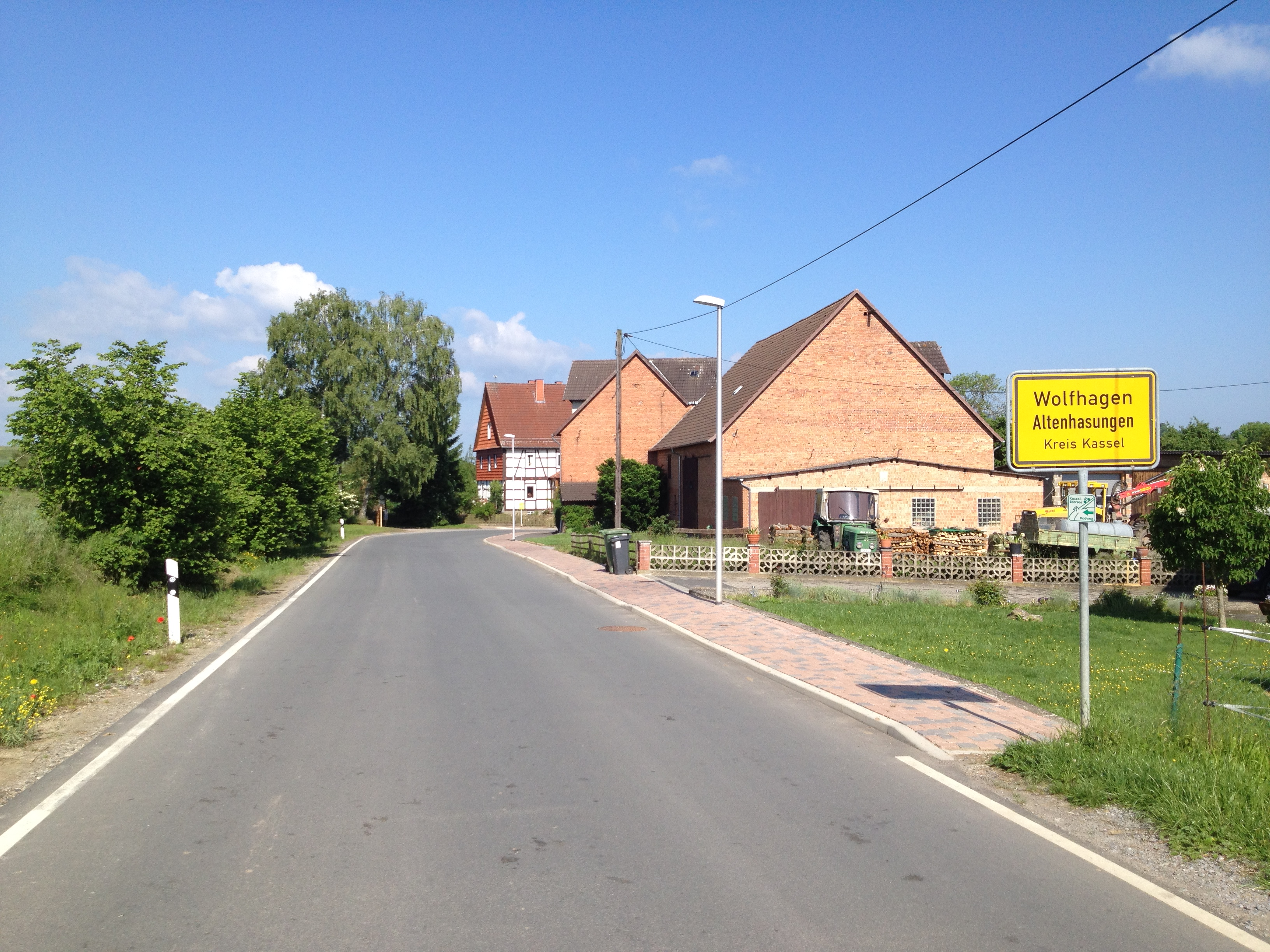 Heerstraße Altenhasungen; Kassel-Edersee-Radweg; Hess. Radfernweg 4